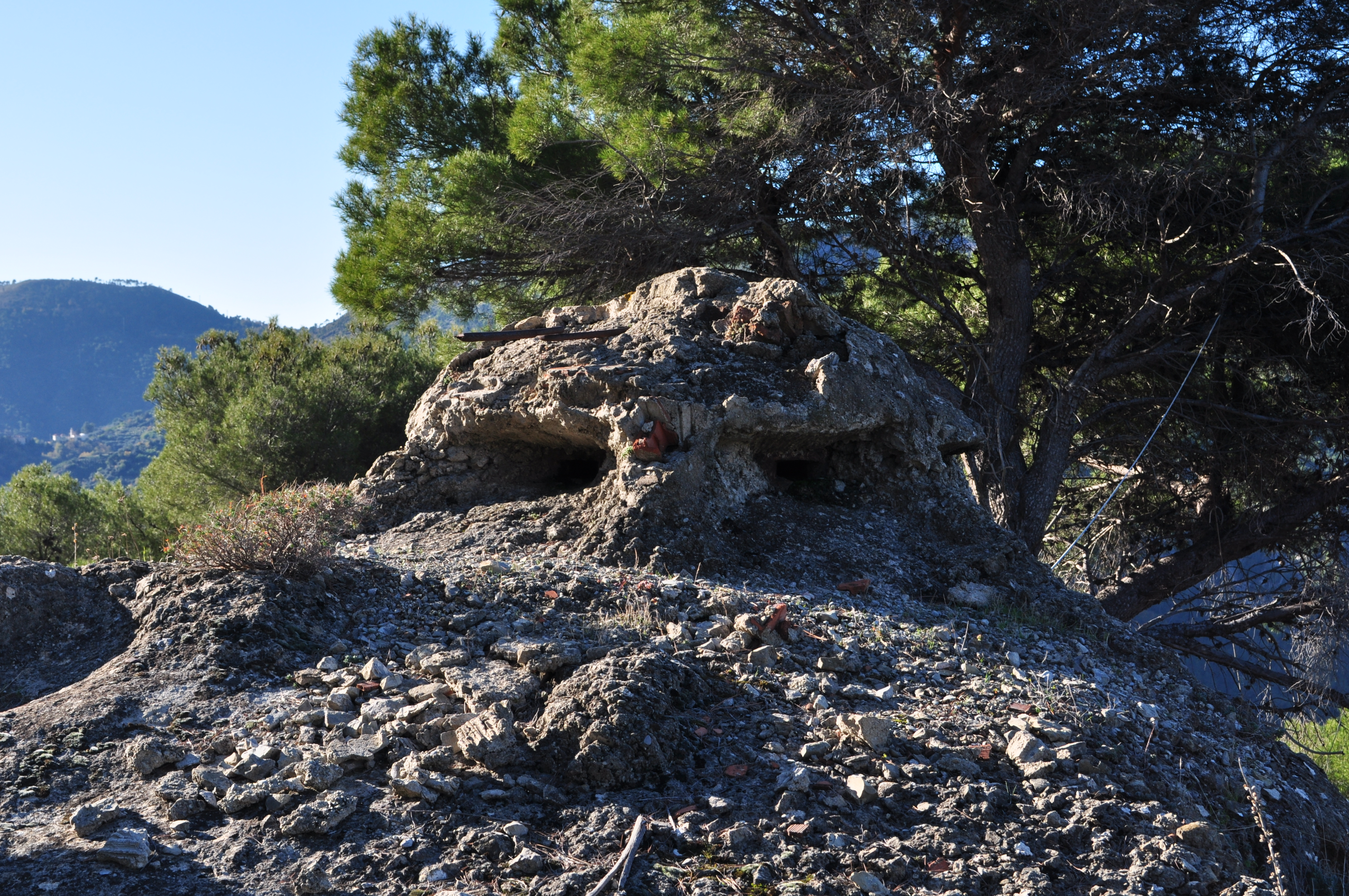 Torretta d'osservazione in acciaio, ricoperta da cemento, presso una delle opere maggiori del Colle di Bevera, Ventimiglia